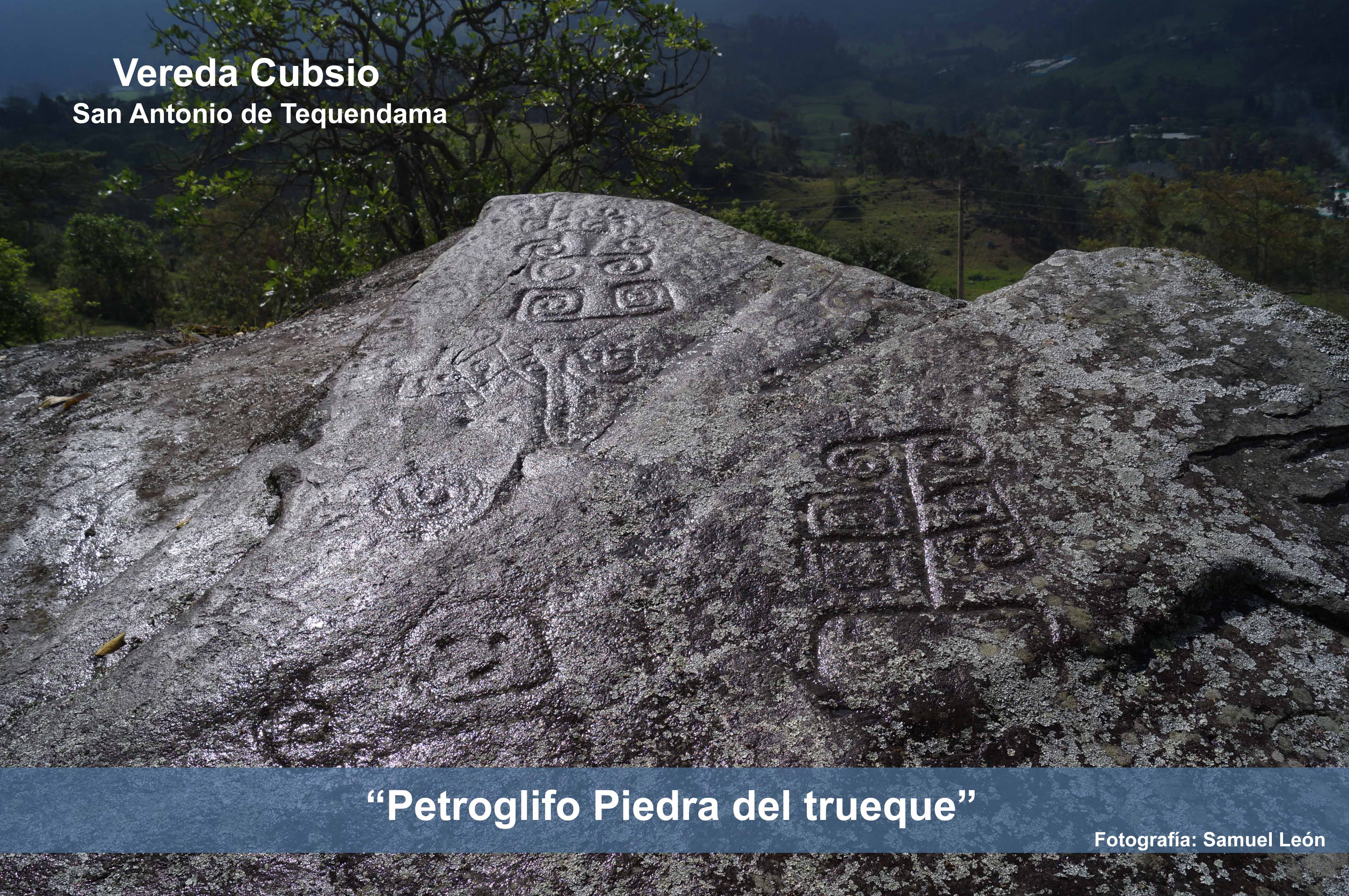 Petroglifo ( Talla en piedra), Vereda Cubsio San Antonio de Tequendama Cundinamarca - Colombia